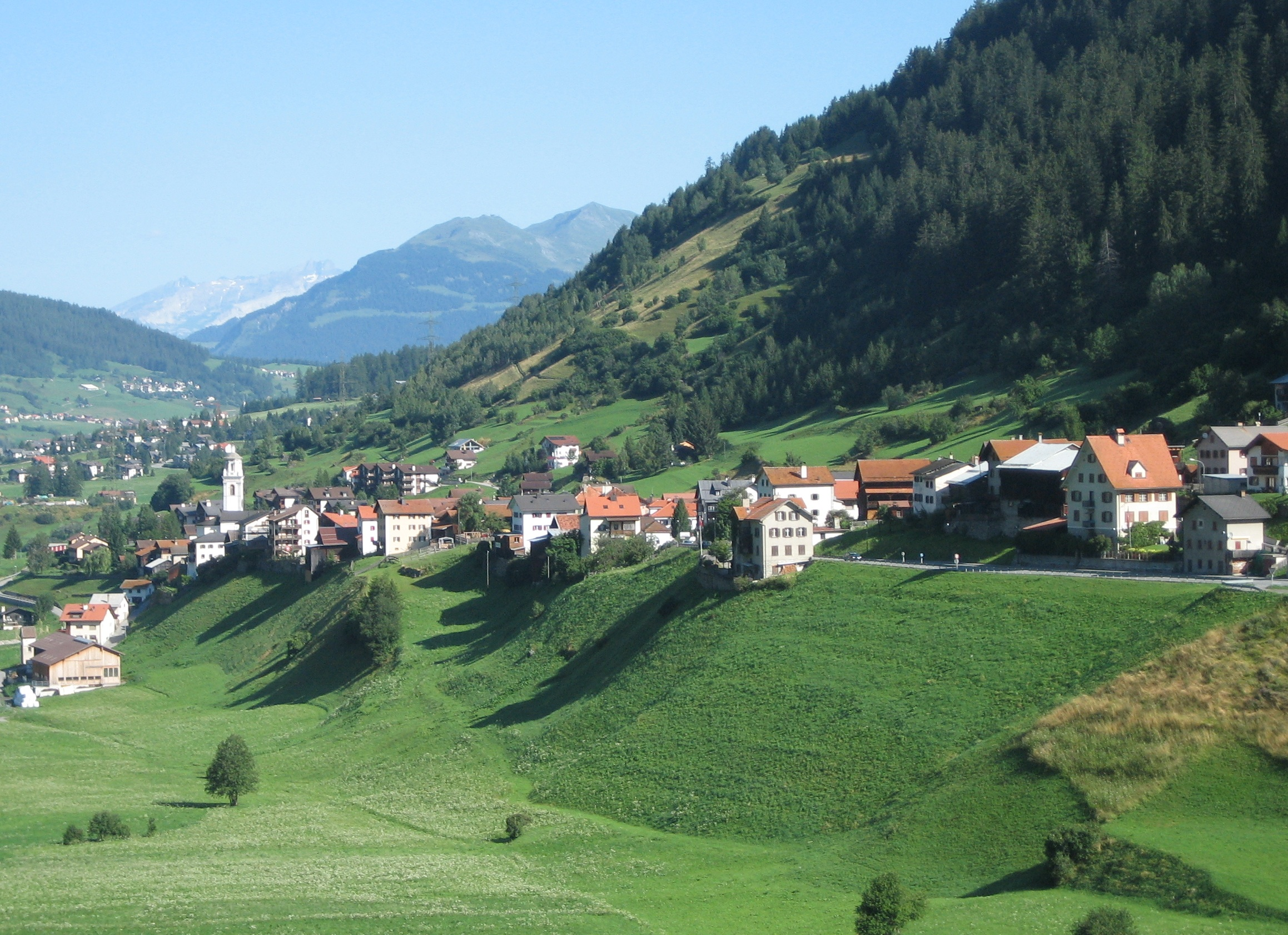 Tinizong, Blick nach Norden